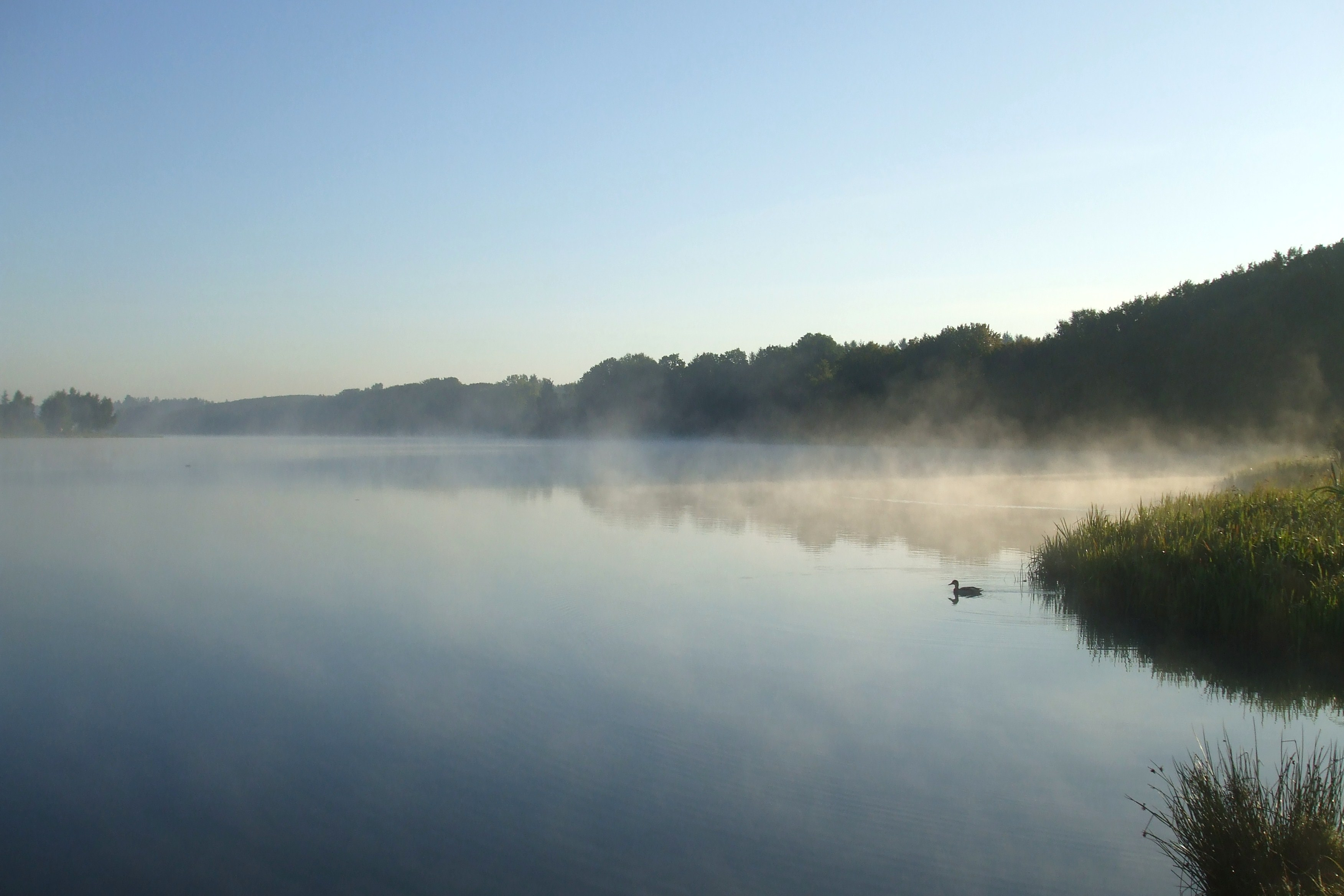 Gdańsk Osowa, jezioro Wysockie.